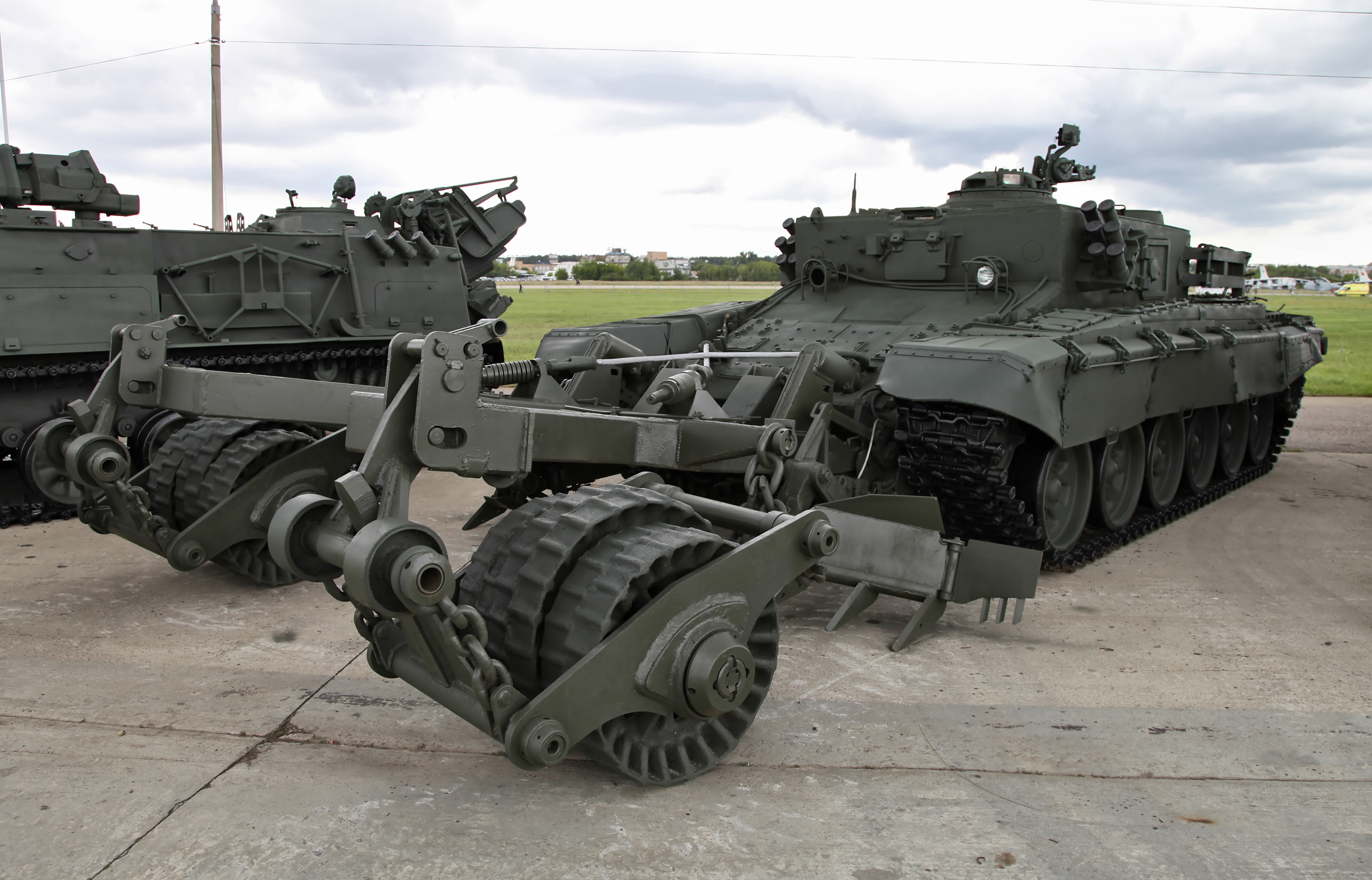 Бронированная машина разминирования БМР-3М (Armored mine-clearing vehicle BMR-3M)